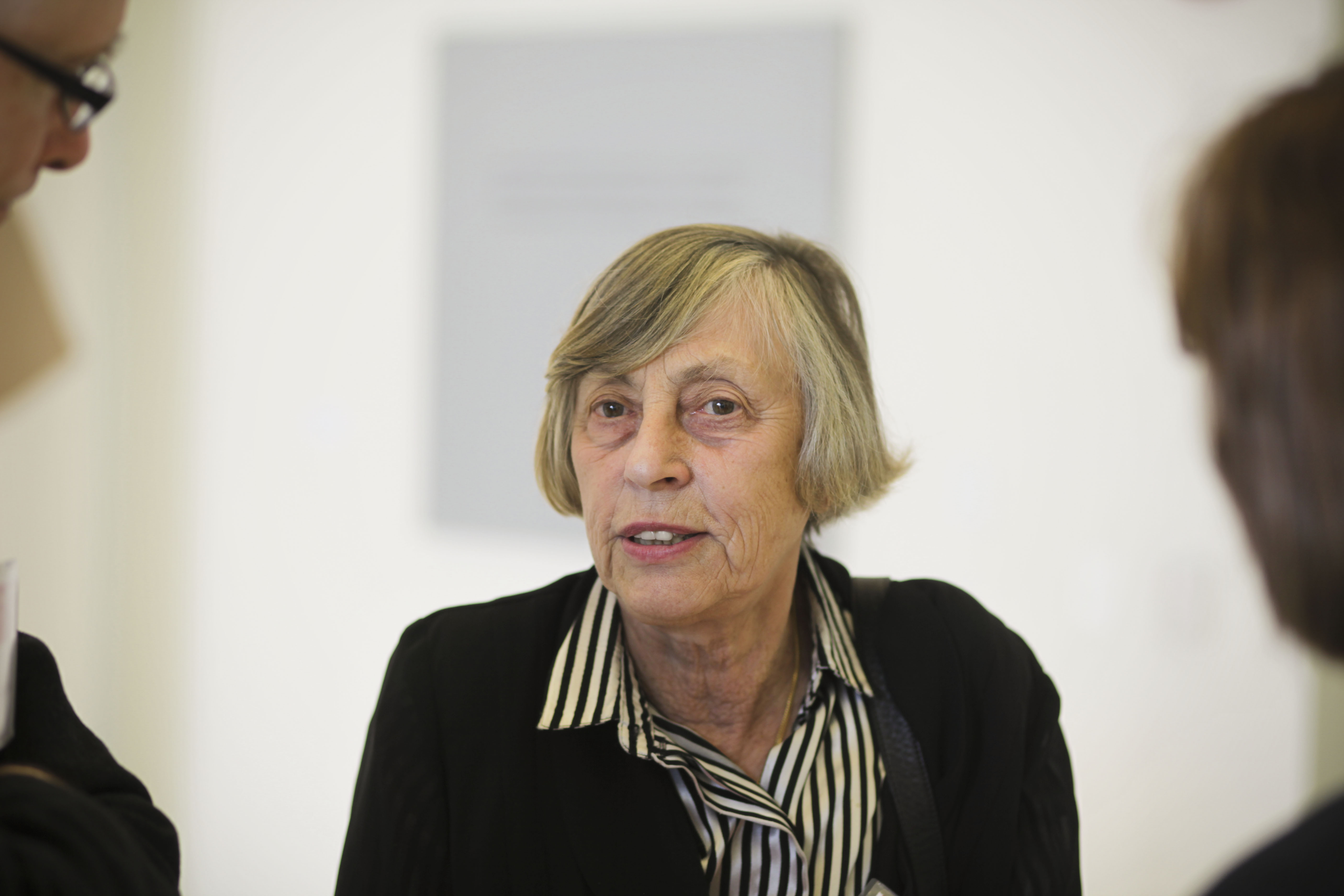 Elinor Nina Czegledy